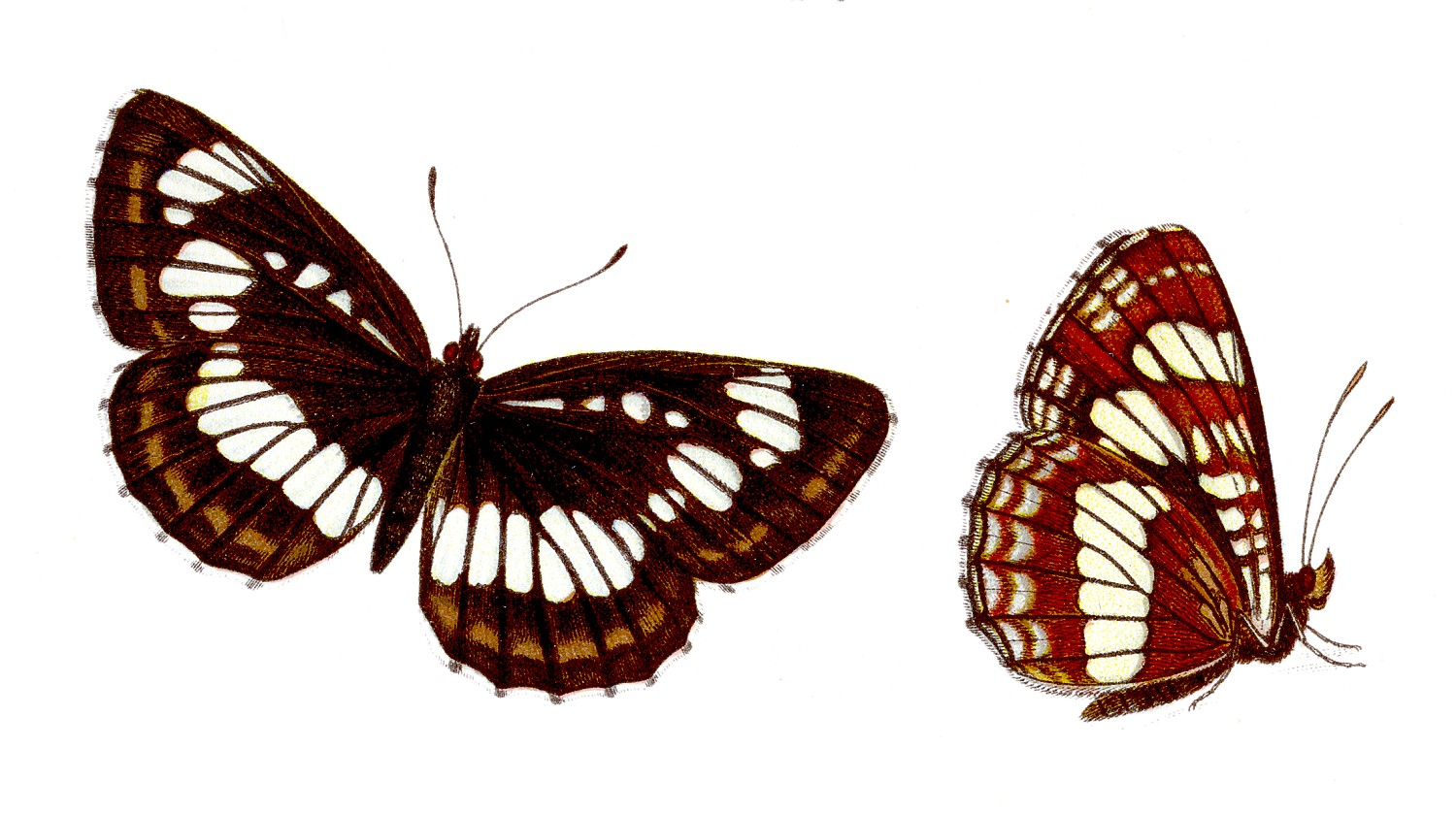 Schwarzer Trauerfalter - Neptis rivularis